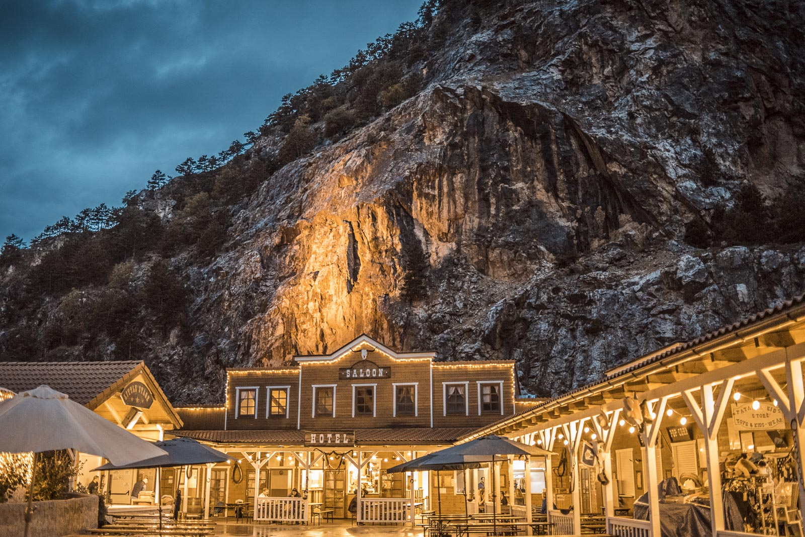 Open Air Foyer Steinbruch Winzendorf